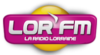 Logo officiel de LOR FM, La radio lorraine !